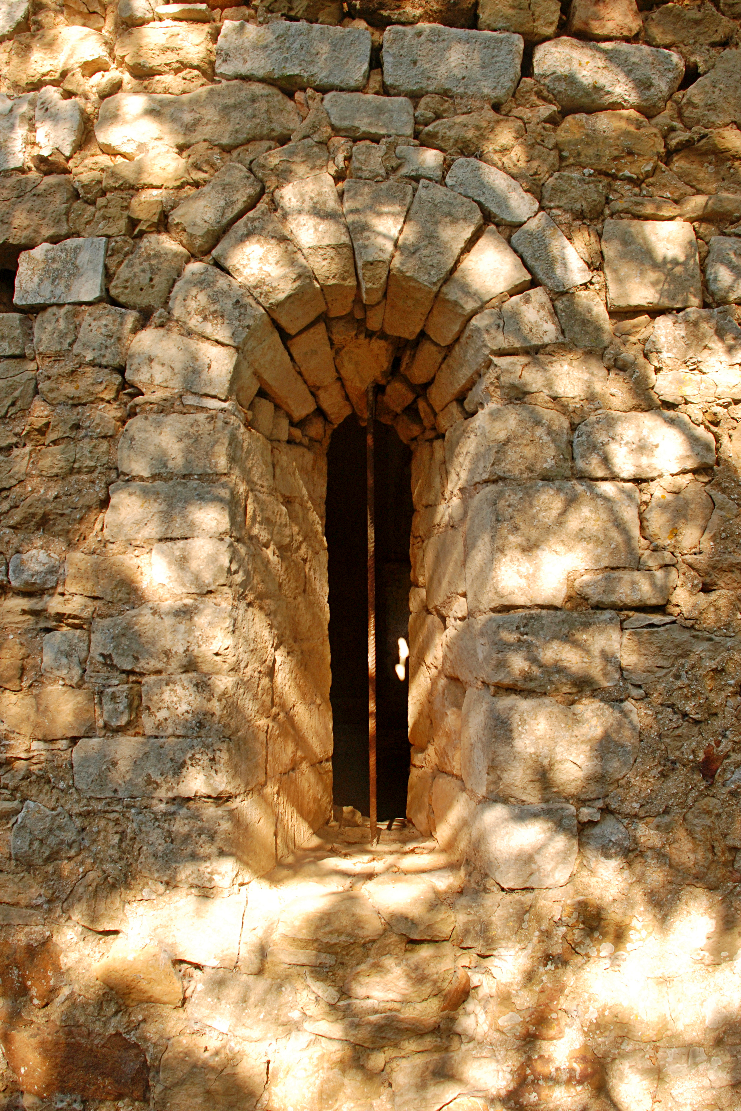 France - Gard - Chapelle Saint-Saturnin de Gaujac